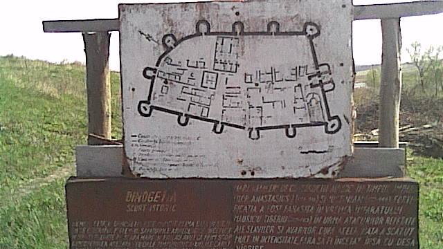 Dinogetia Site